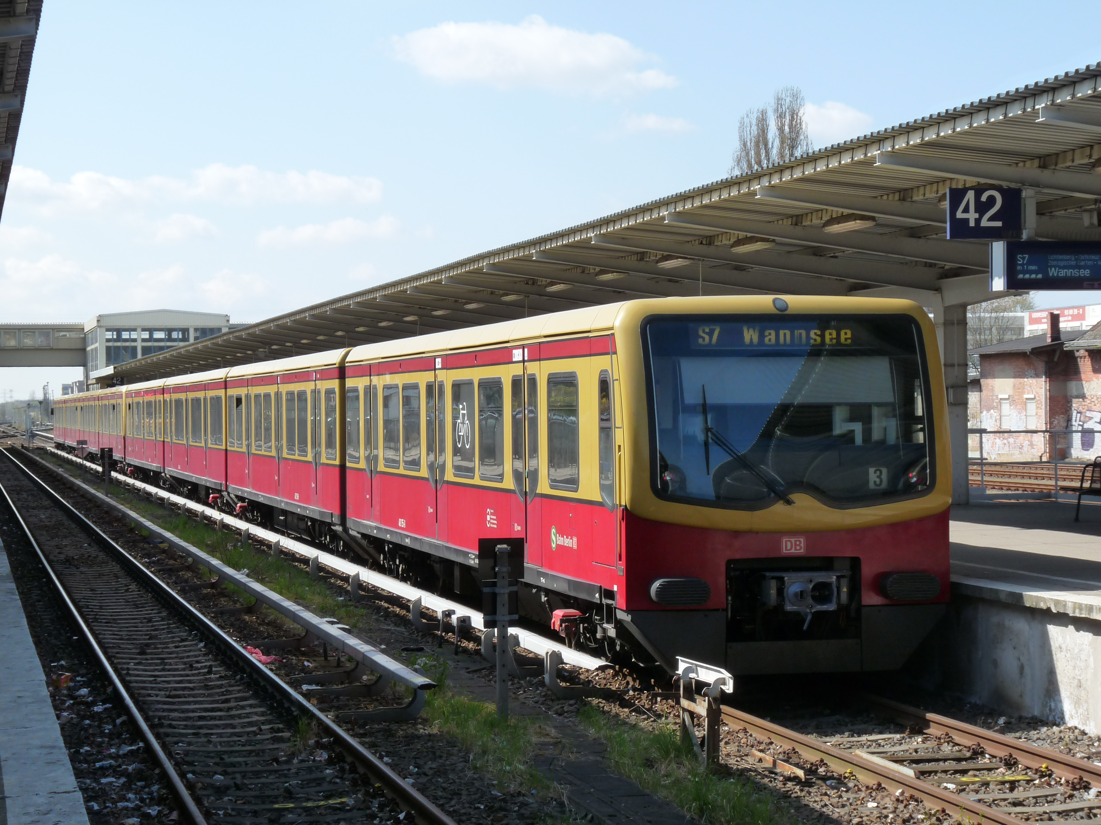 Het S-Bahn eindpunt in Ahrensfelde